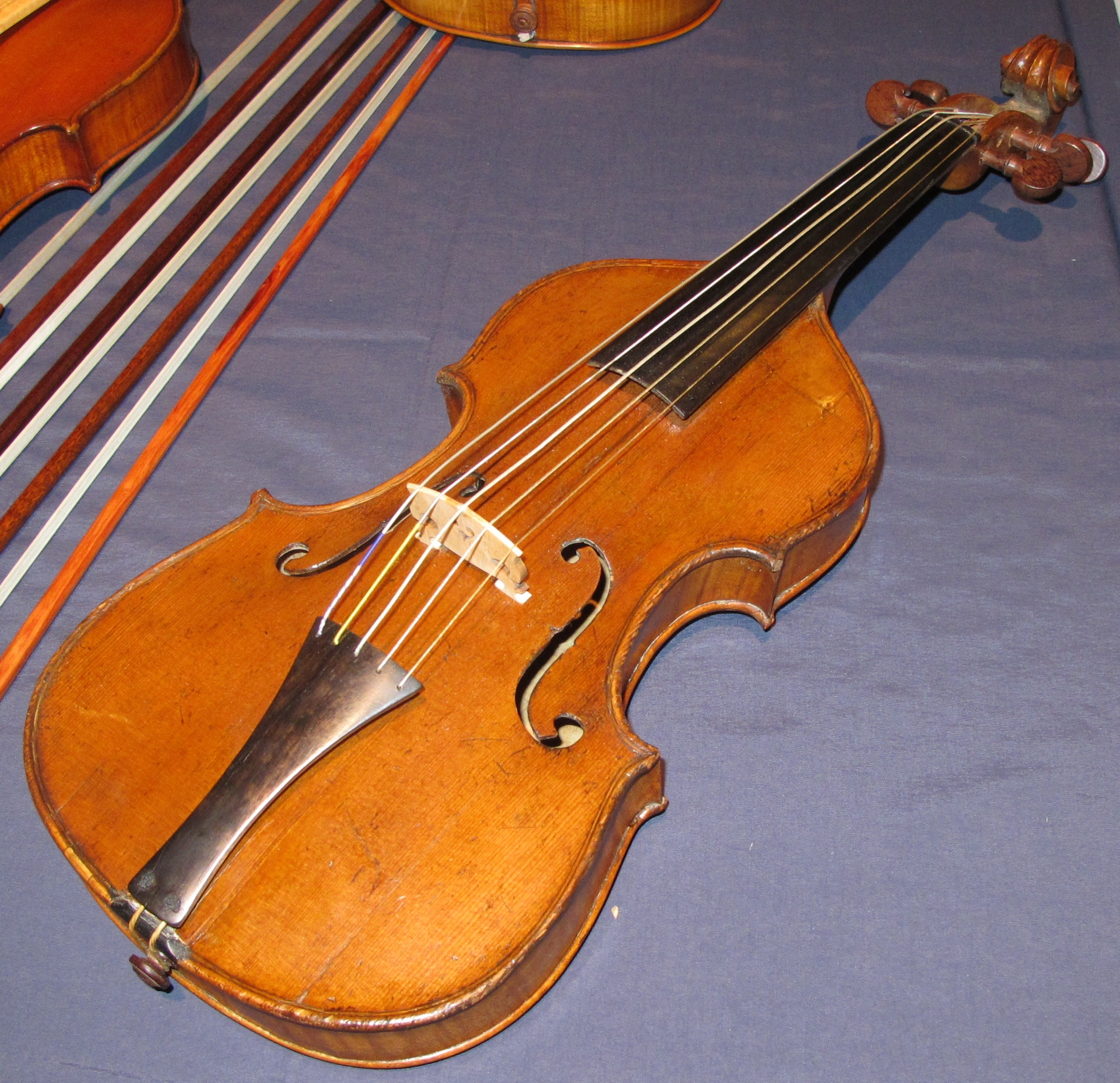 Quinton, fünfsaitige Violine, Mirecourt um 1800